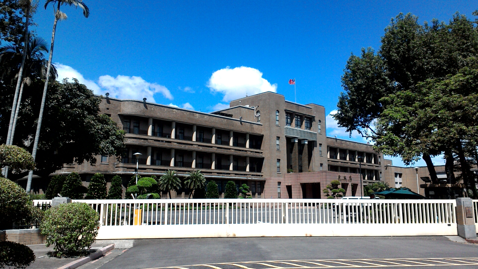 行政院中央大樓,台北市中正區東門次分區梅花里